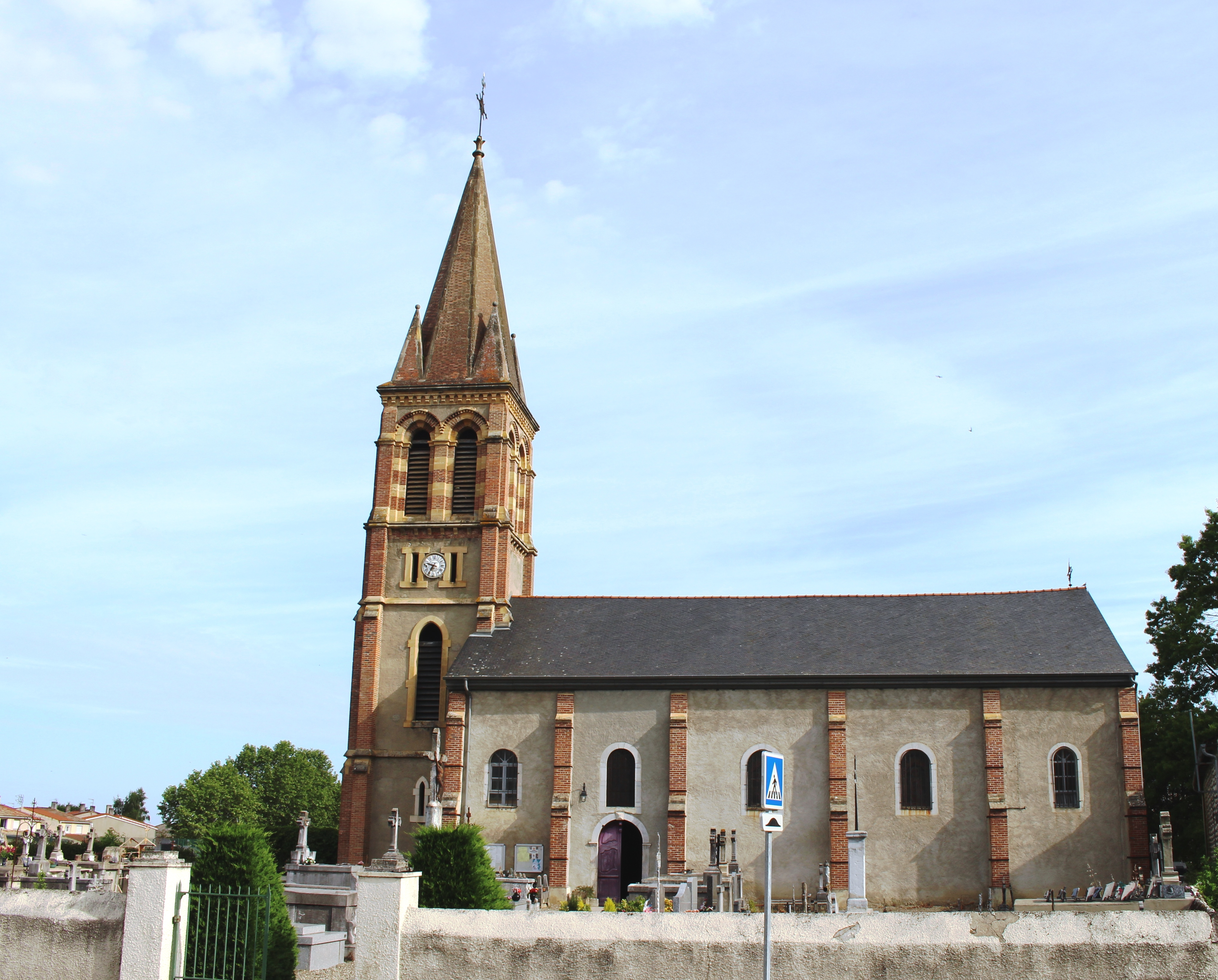 Église Notre-Dame-de-l'Assomption de Barbazan-Debat (Hautes-Pyrénées)